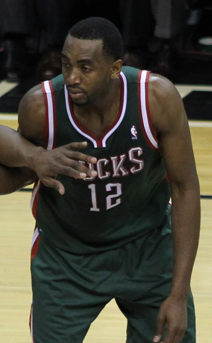 Wizards v/s Bucks 03/08/11